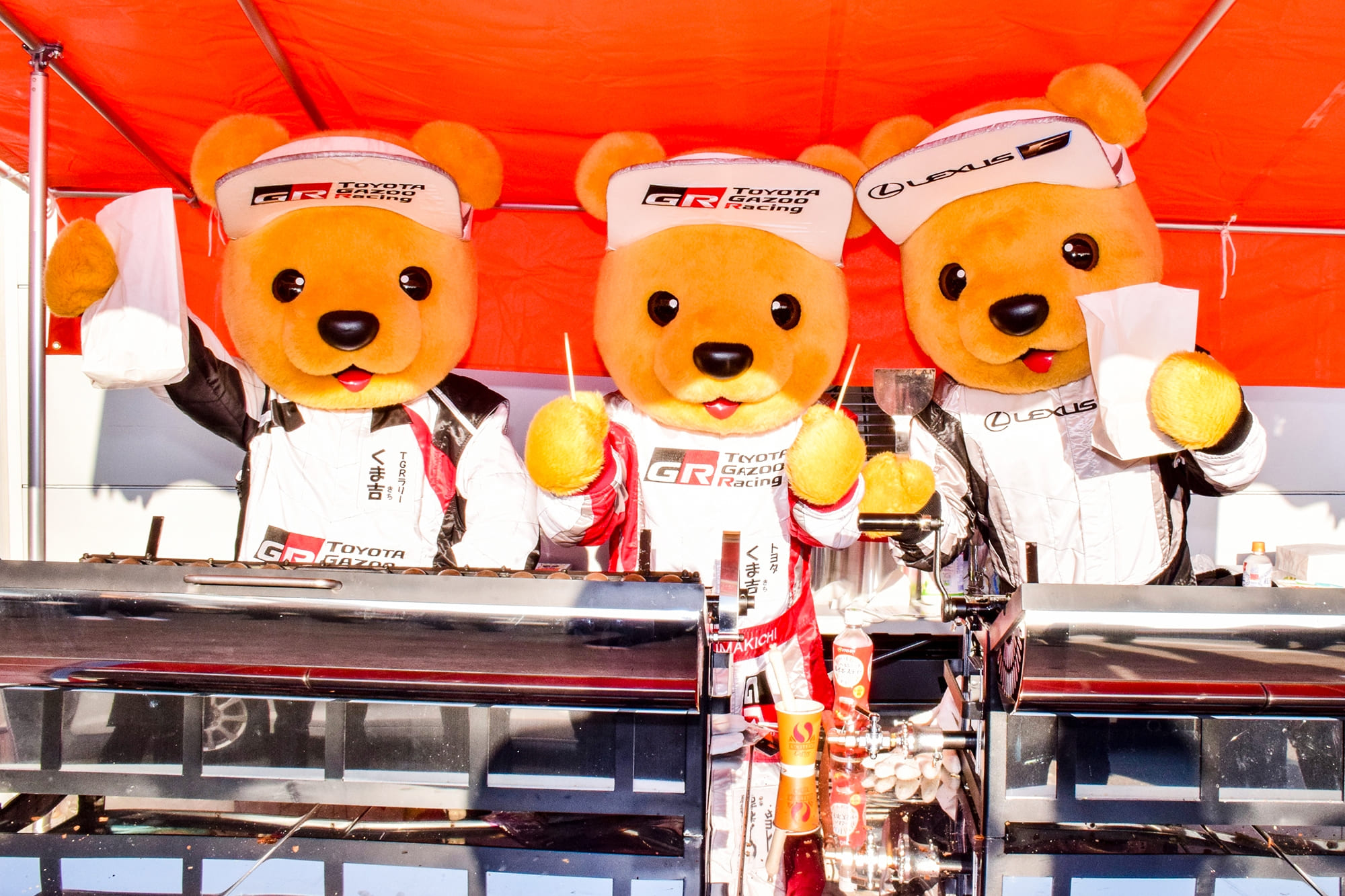 TGRFの屋台で売り子をするTGRラリーくま吉、トヨタ くま吉、レクサスくま吉